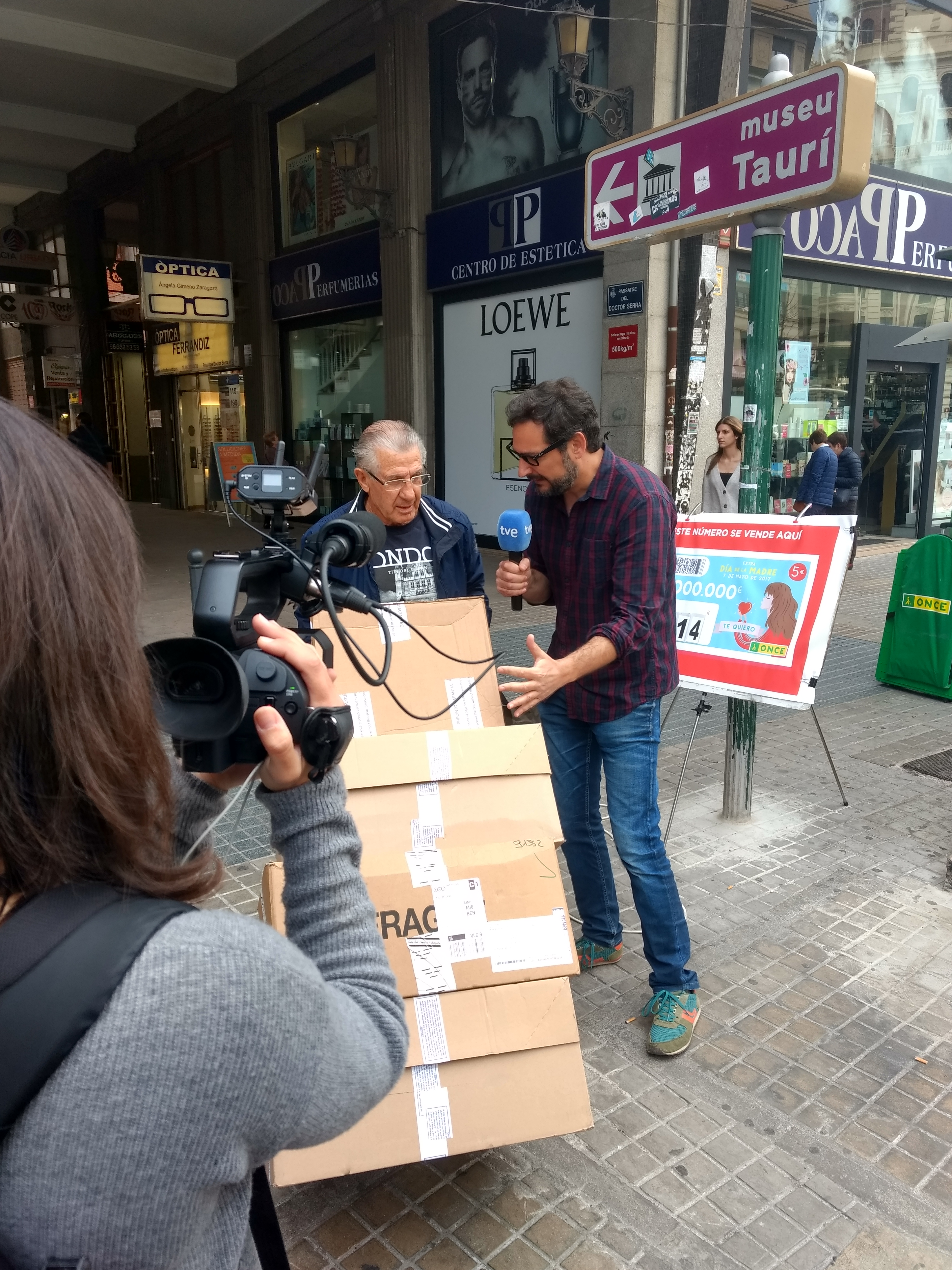 Eugeni Alemany enregistrant un reportatge sobre l'anell ciclista de València i el repartiment de mercaderies al nucli urbà. Va ser emés al programa Tips i jo hi vaig participar.